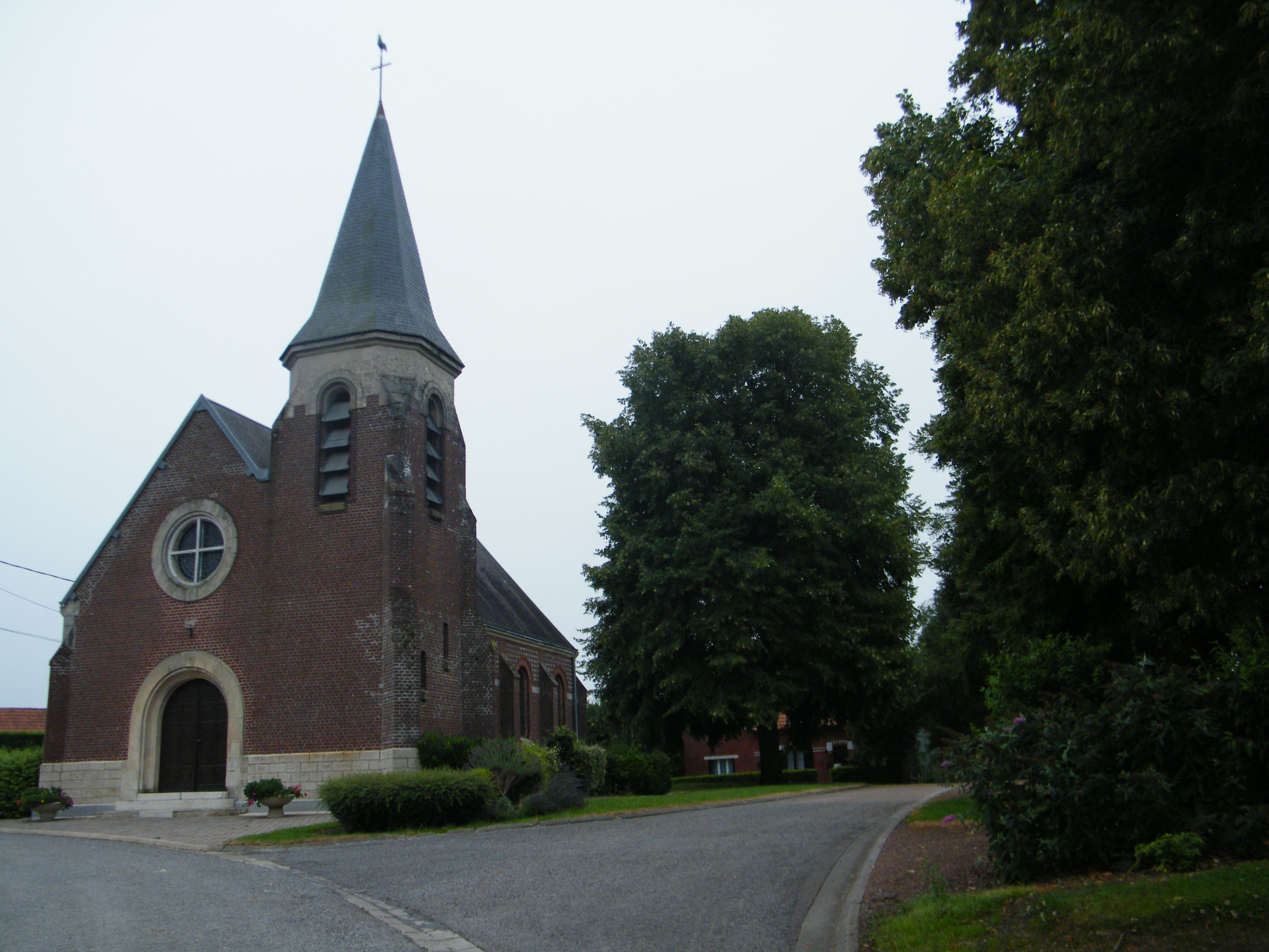 Eglise.